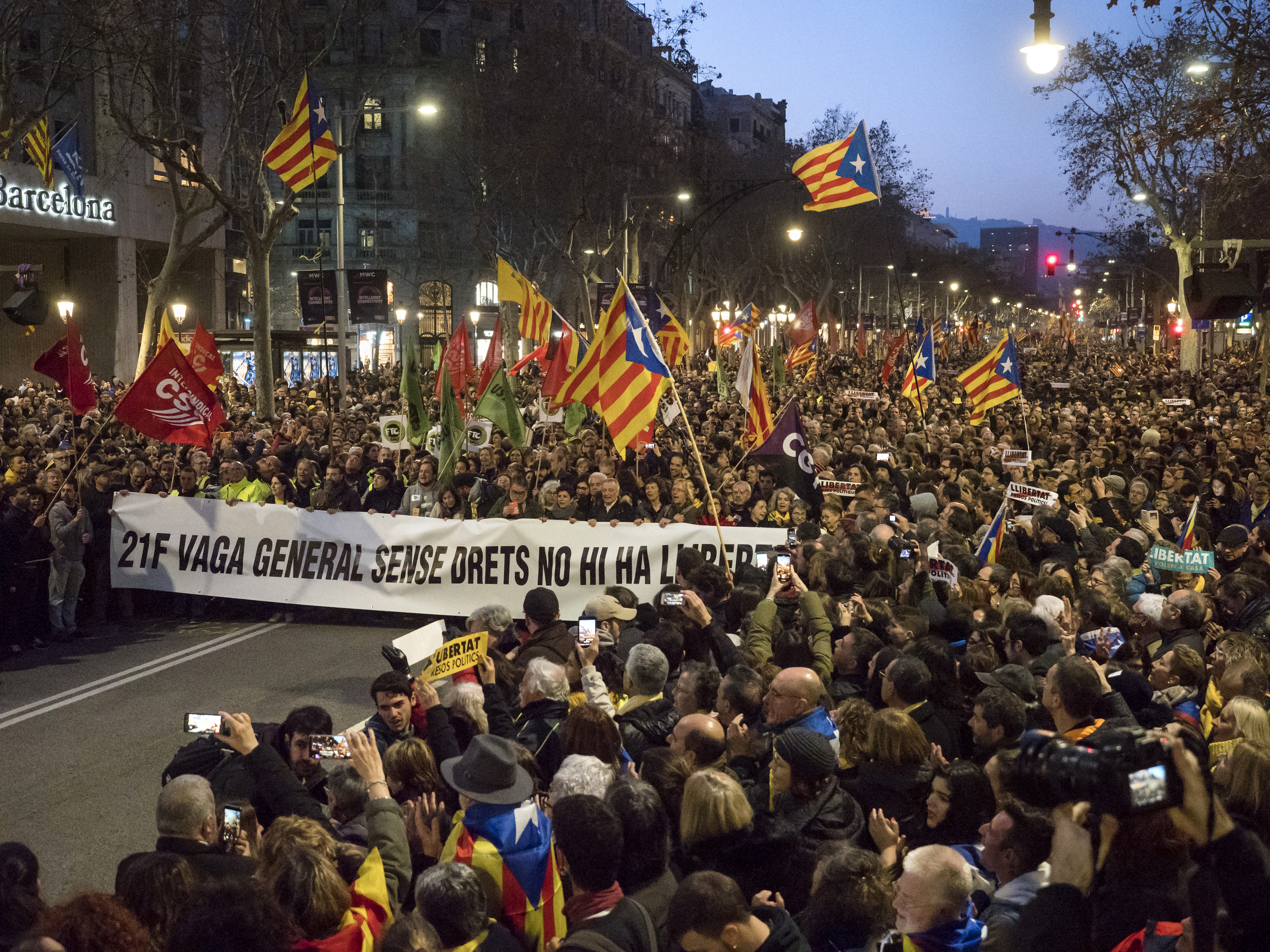 Vaga " 21-F: aturem el país!"